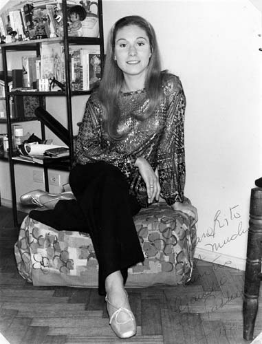 Fotografía blanco y negro sobre papel fotográfico brillante. Retrato de la actriz Alejandra Da Passano (1947-2014) de cuerpo entero, sentada en un sillón, mirando a cámara y sonriendo.